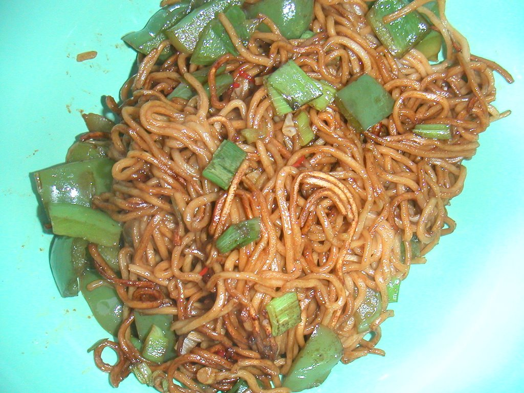 Stegte nudler